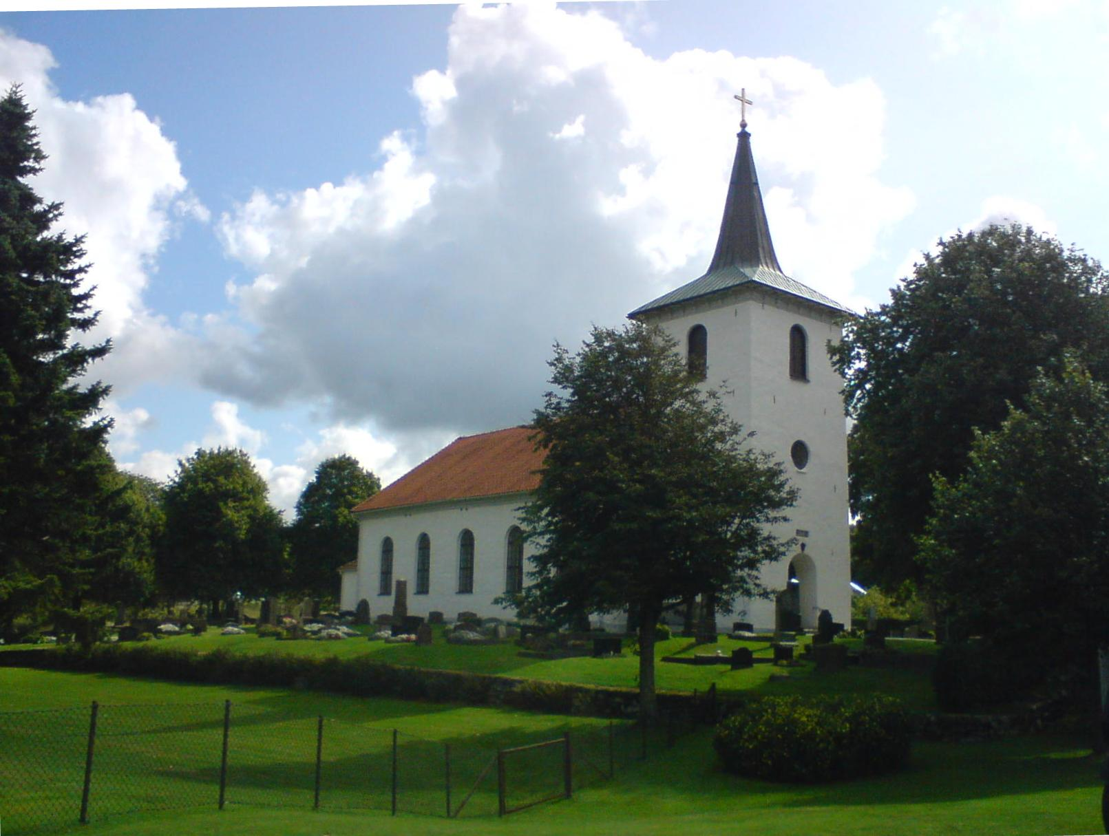 Vy över Röra kyrka, som ligger i den mittre delen av Orust i Bohuslän.